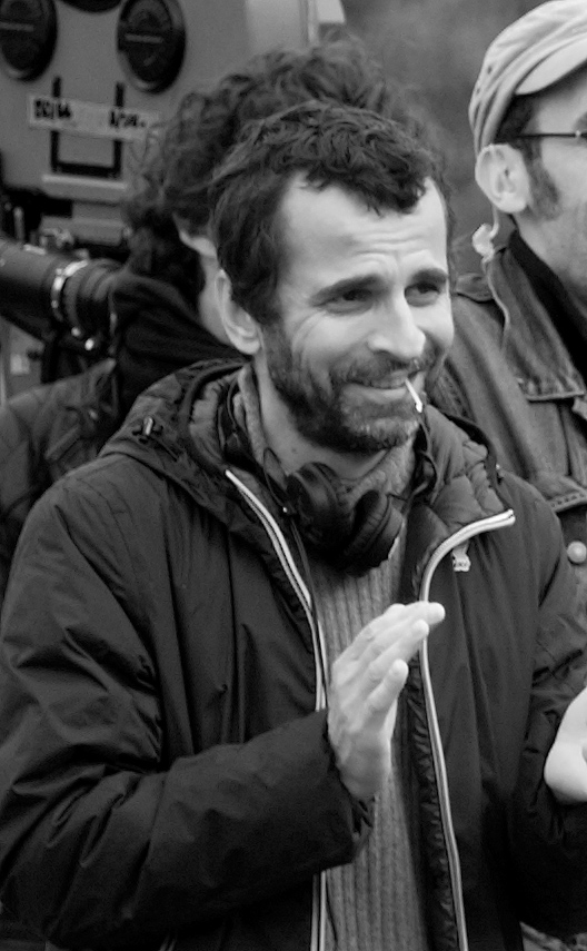 Eric lartigau sur le tournage de "L'homme qui voulait vivre sa vie" sur le port du Bono (Morbihan 56)